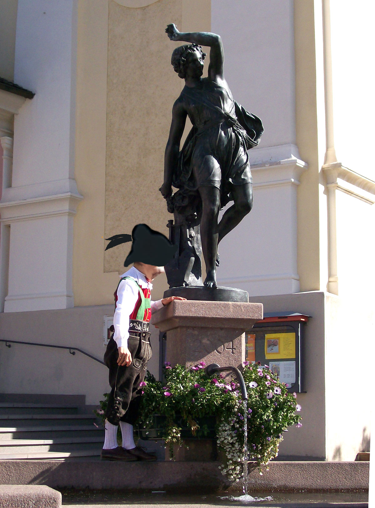 Terpsichore des Johann Dominik Mahlknecht (Überwasser bei St. Ulrich in Gröden 1793-1876 Paris) auf den Kirchplatz von seinem Geburtsort